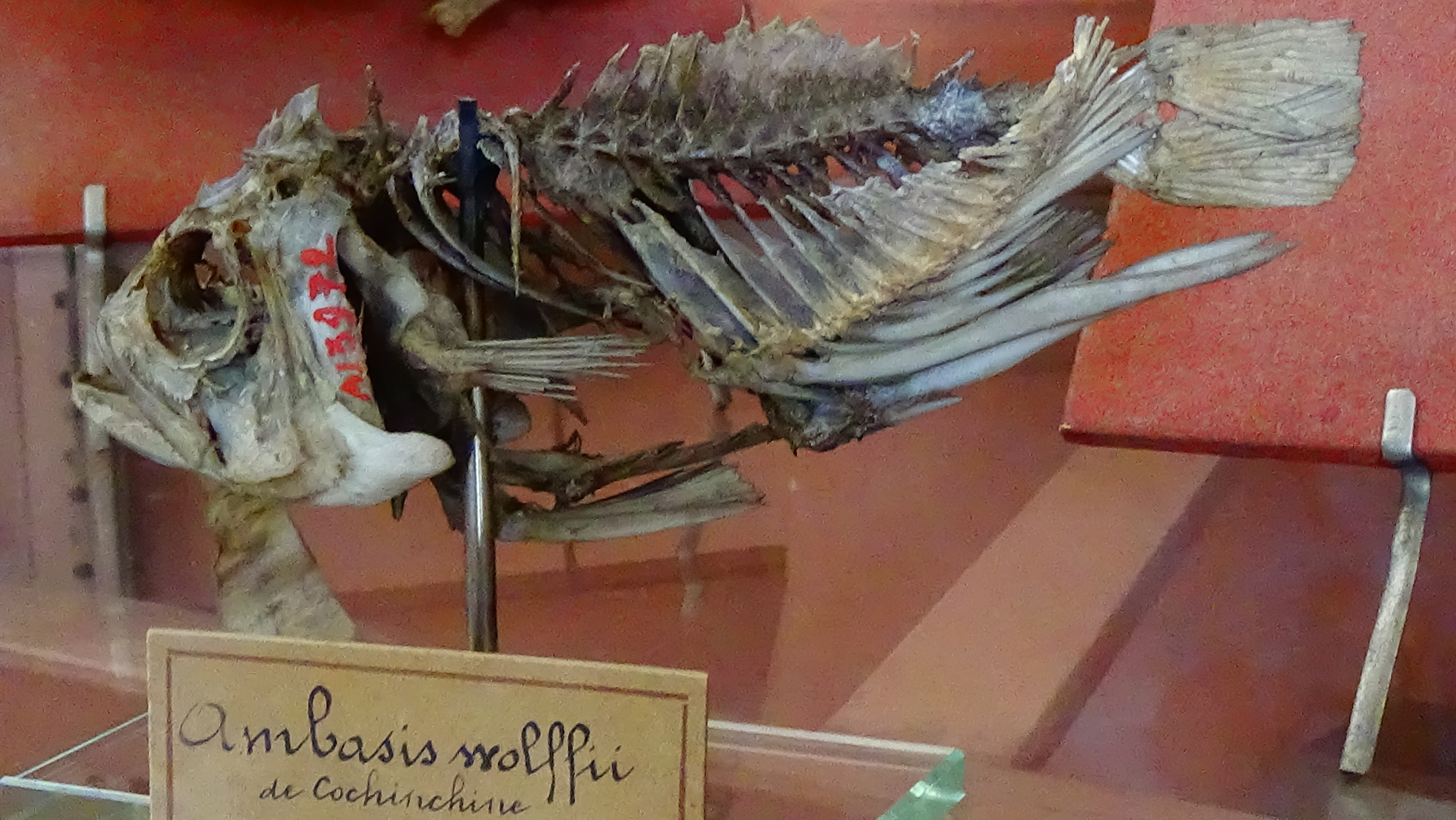 Ambassis wolffii - sueletteMnhn